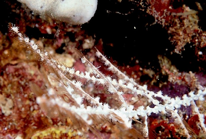 Hydrozoanthus sp. en Tanjung Pandan, sudoeste de Pulau Panjang, Kalimantan este, islas Berau, 2003. Reimer J, Poliseno A, Hoeksema B (2014) Shallow-water zoantharians (Cnidaria, Hexacorallia) from the Central Indo-Pacific. ZooKeys 444: 1-57.